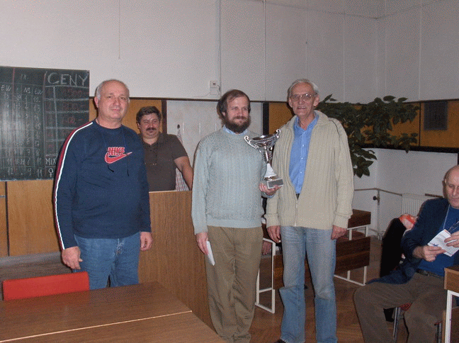 Víťazi Karpatského pohára - páry 2008